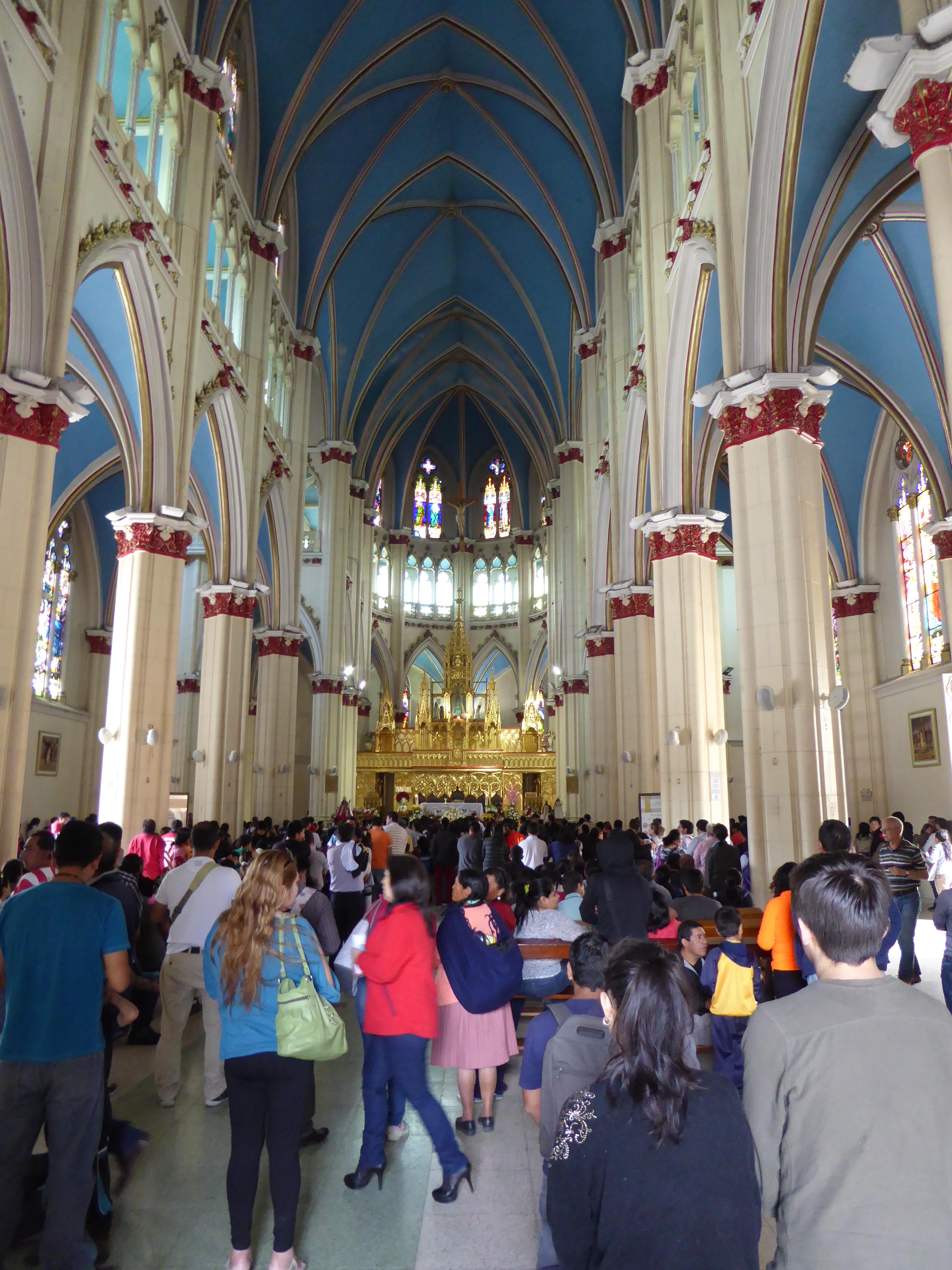 In der Kathedrale El Santuario